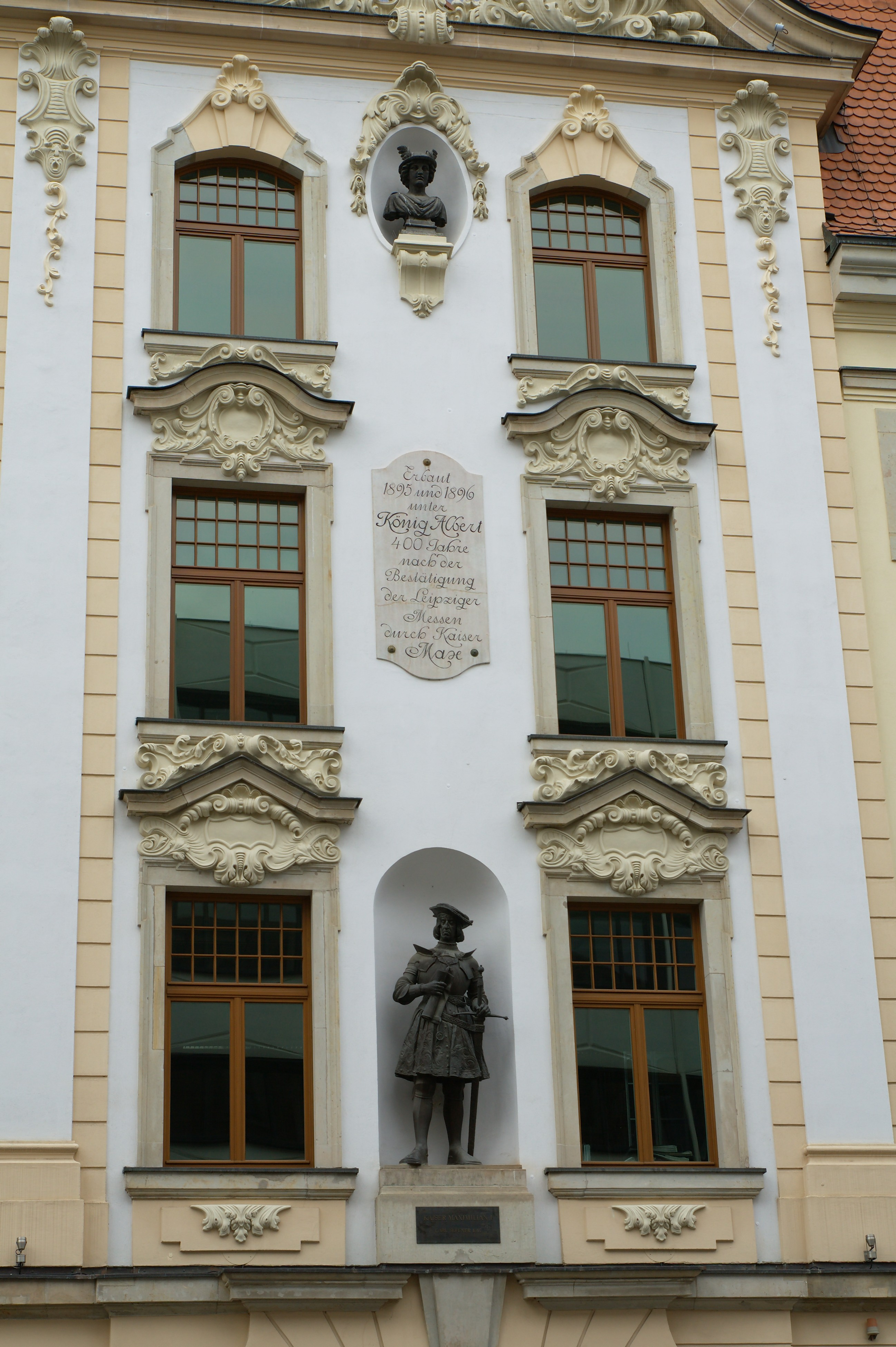 Bronzestatue Maximilian I., geschaffen 1897 von Carl Seffner, am Messehaus Städtisches Kaufhaus in Leipzig.